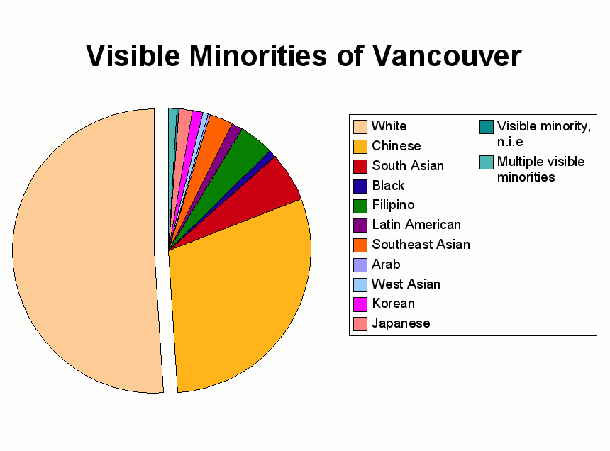 מיעוטים נראים לעין של ונקובר